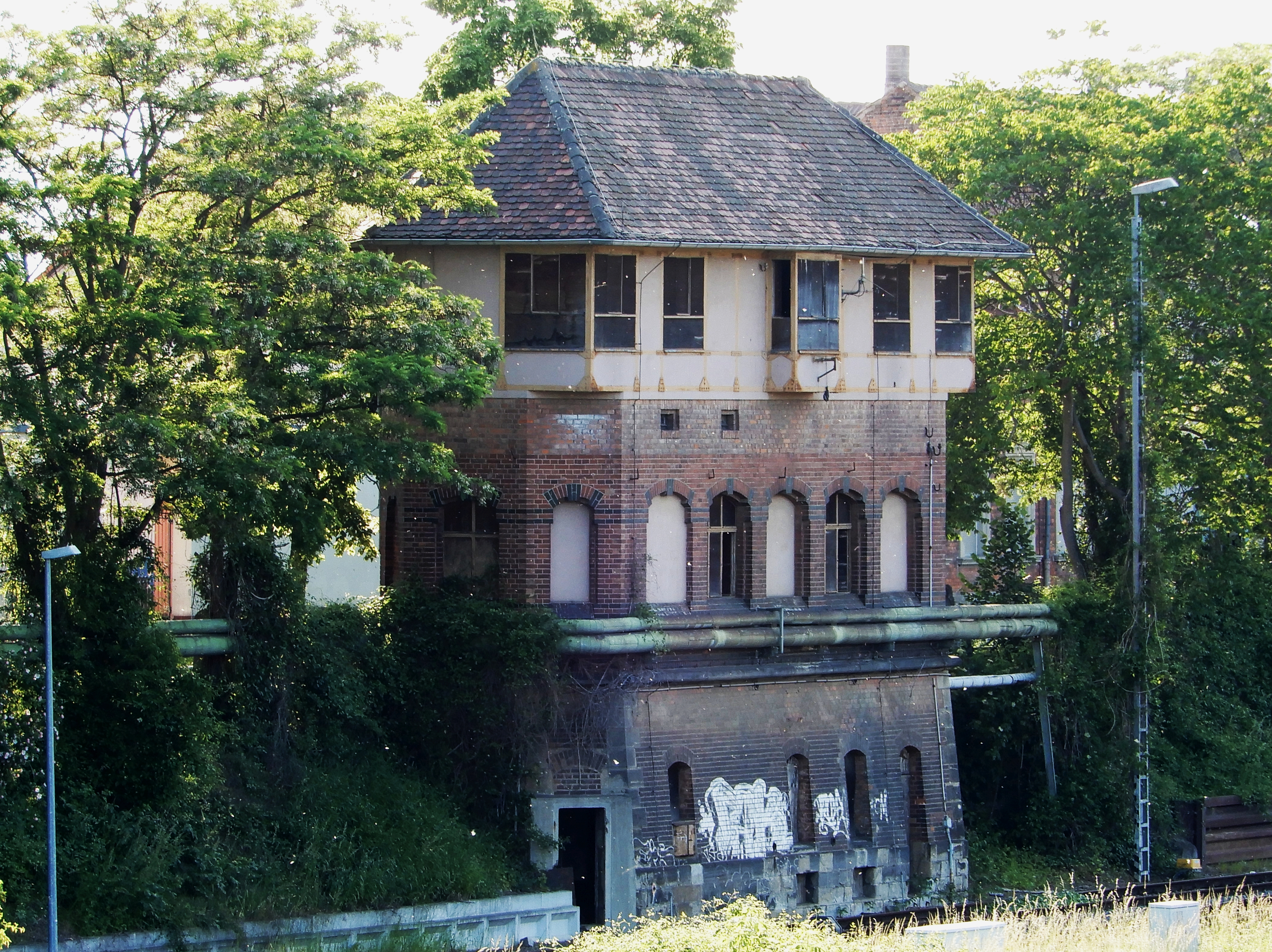 Stellwerk Heinrichstraße 54 in Aschersleben